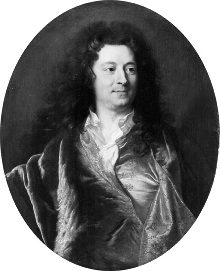 Charles de La Fosse par Hyacinthe Rigaud